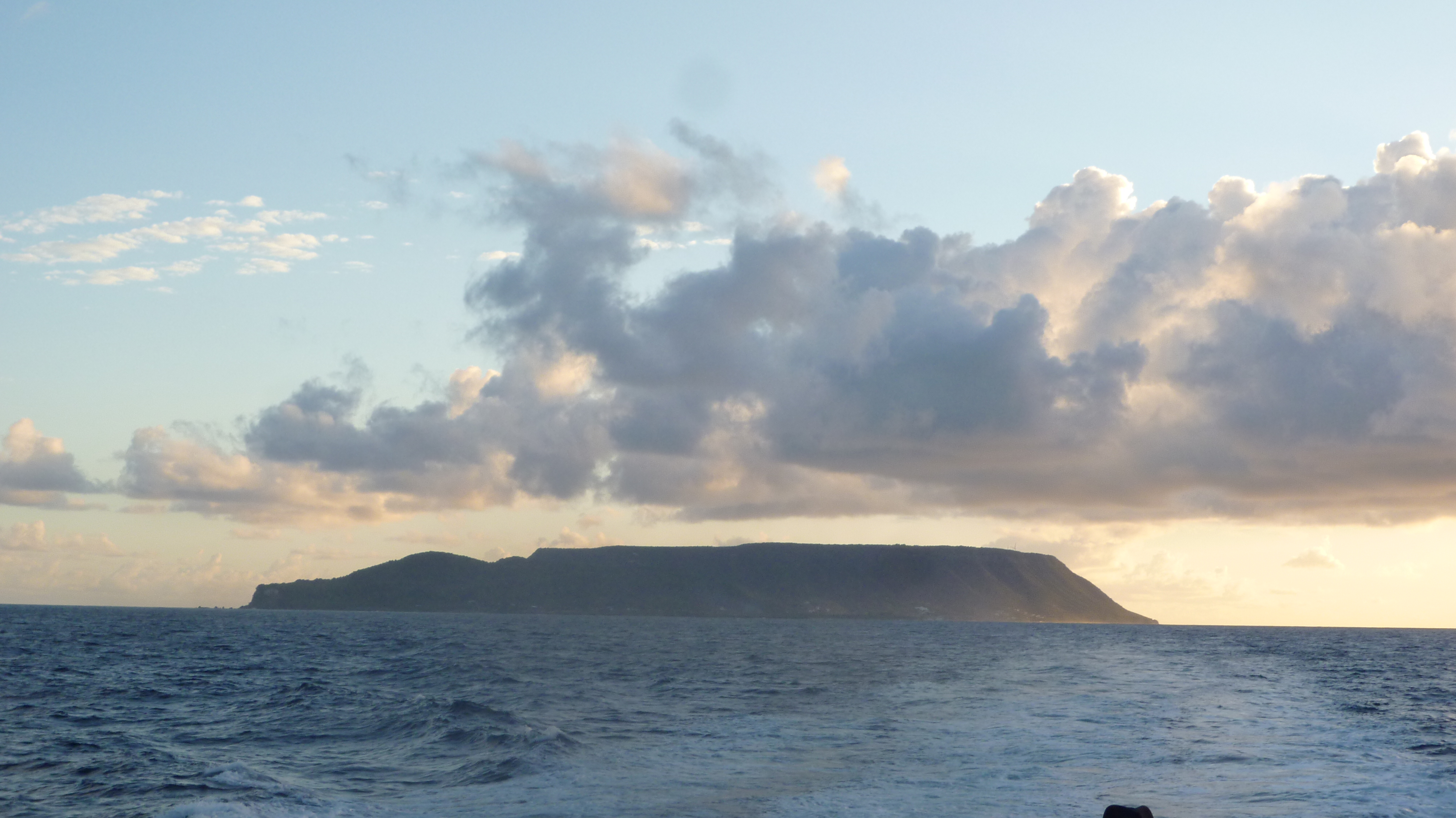 Le crocodile entre Grande Terre et la Désirade